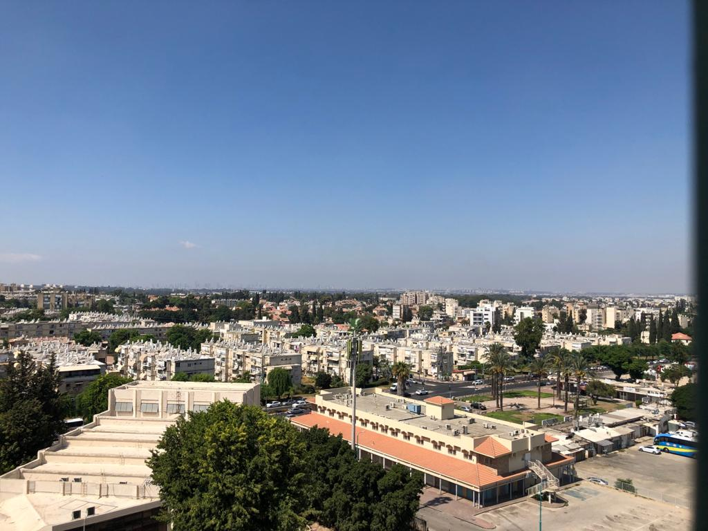 مطل لمدينة الرملة من الجامع الابيض